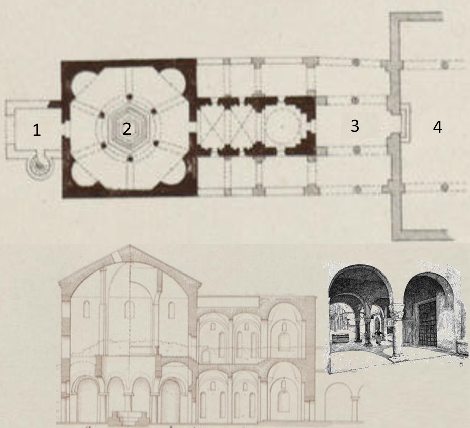 Section of the Aquileia Basilica, showing how the Pagan Church looked like at the end of the nineteenth century.